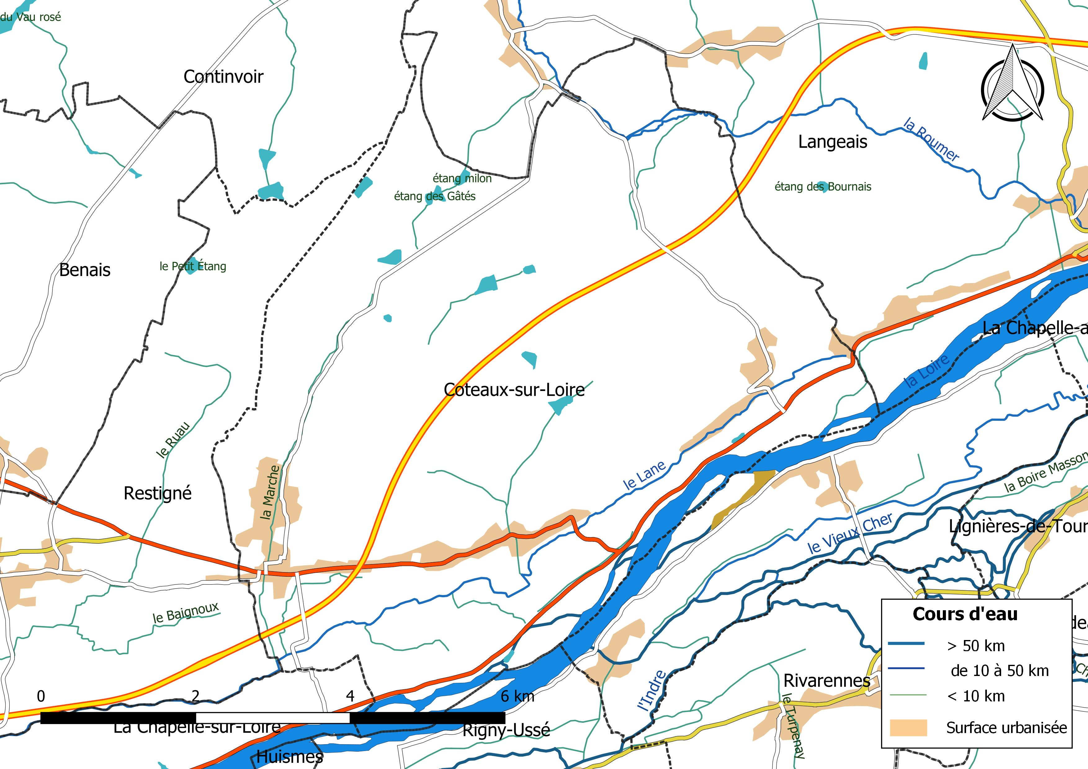 Carte du réseau hydrographique de la commune de Coteaux sur Loire (France).